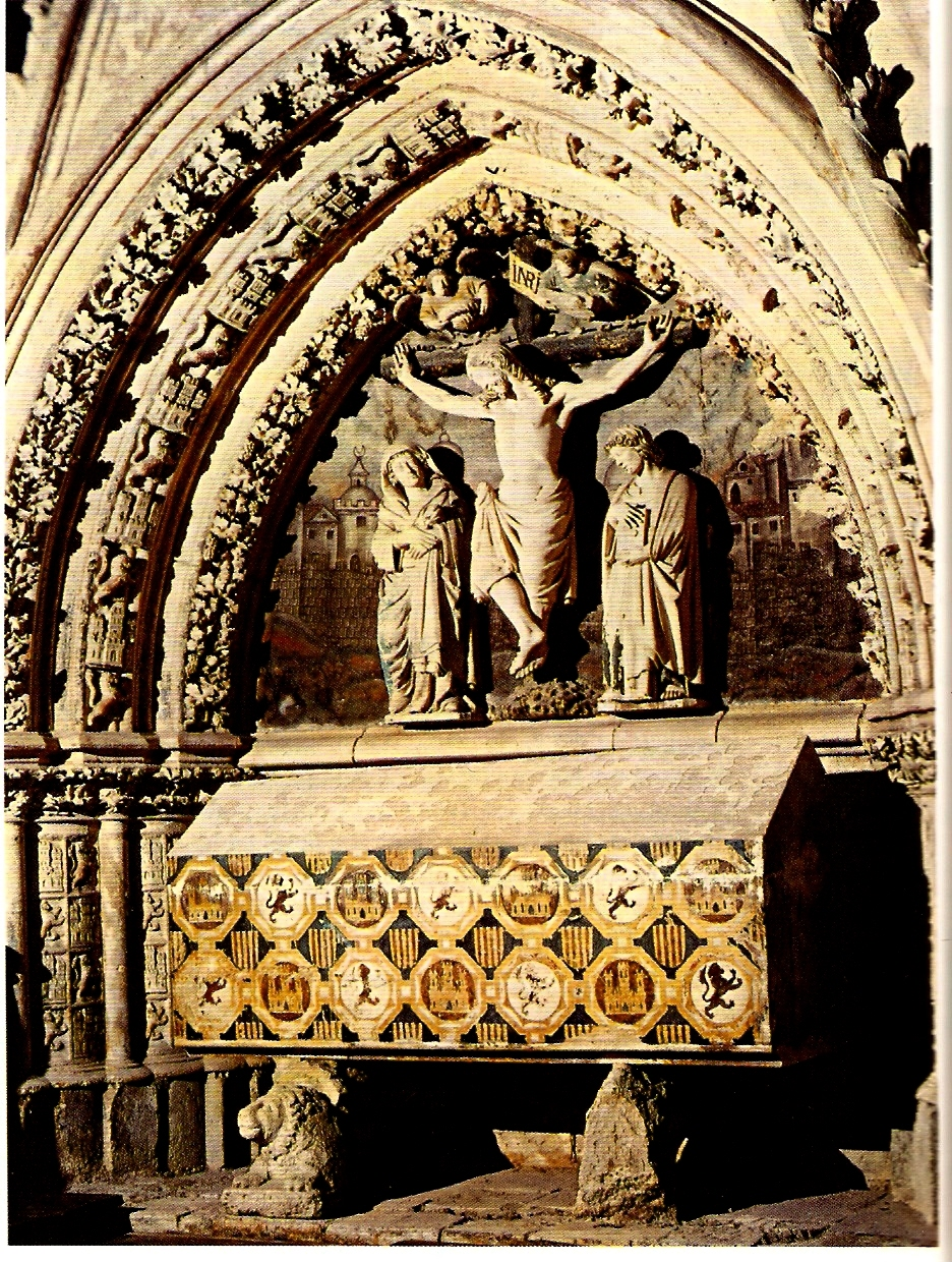 Sepulcro del infante Don Fernando de la Cerda, hijo de Alfonso X el Sabio, rey de Castilla y León. Se encuentra en el Real Monasterio de Santa María de las Huelgas de Burgos (España). En el mismo monasterio se encuentra el sepulcro de su hijo, Don Alfonso de la Cerda "el Desheredado", nieto de Alfonso X el Sabio.